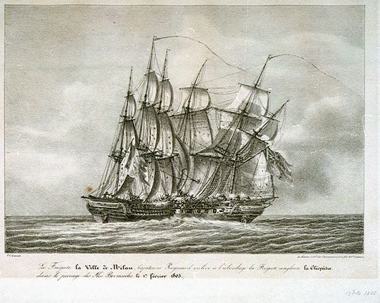 La Fregate la Ville de Milan Capitaine Reynaud enleve a l'abordage la Fregate anglais la Cleopatre dans le parage des Iles Bermudis, le 17 fevrier 1805